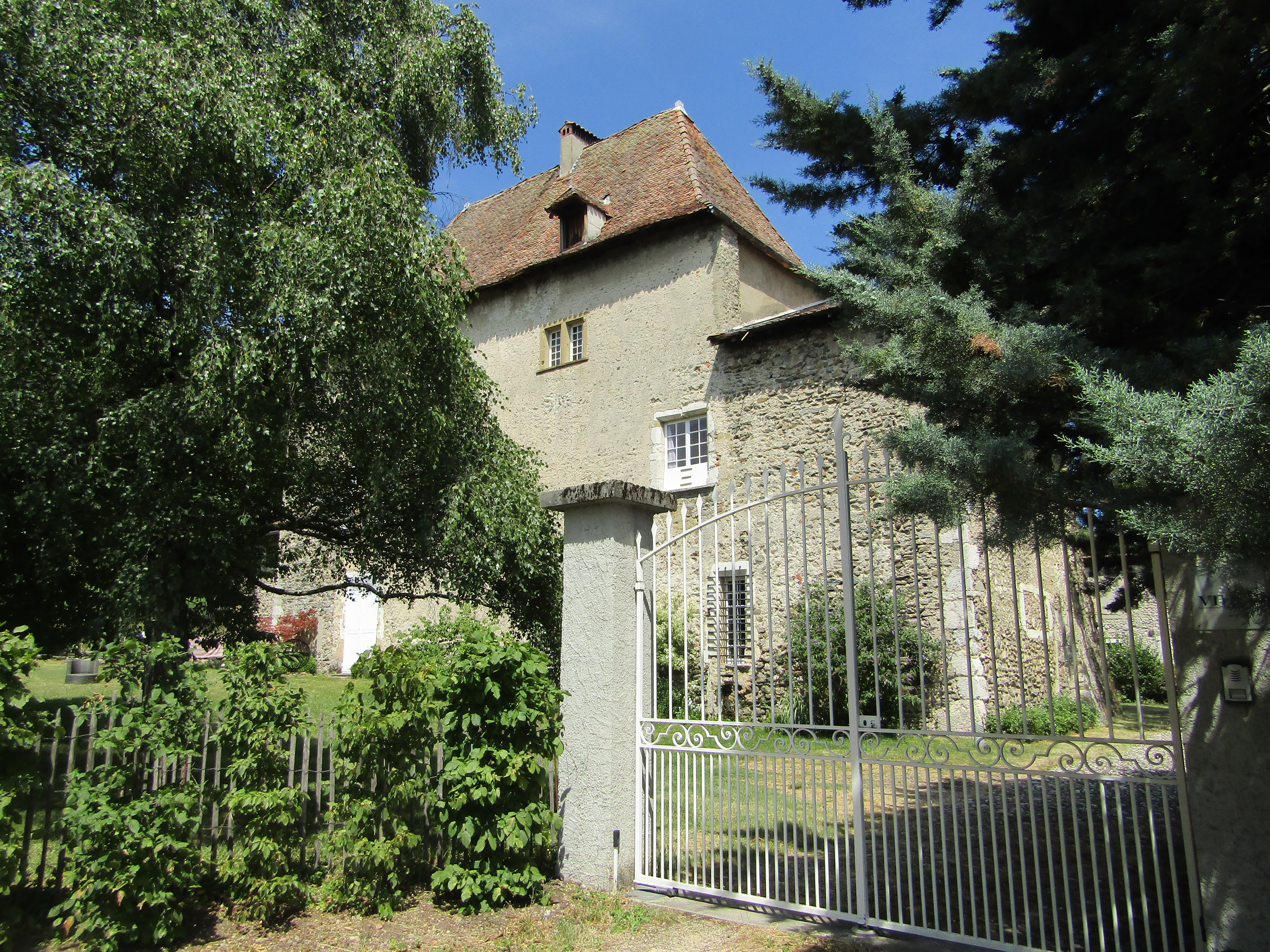 Château de La Murette ou des Champs